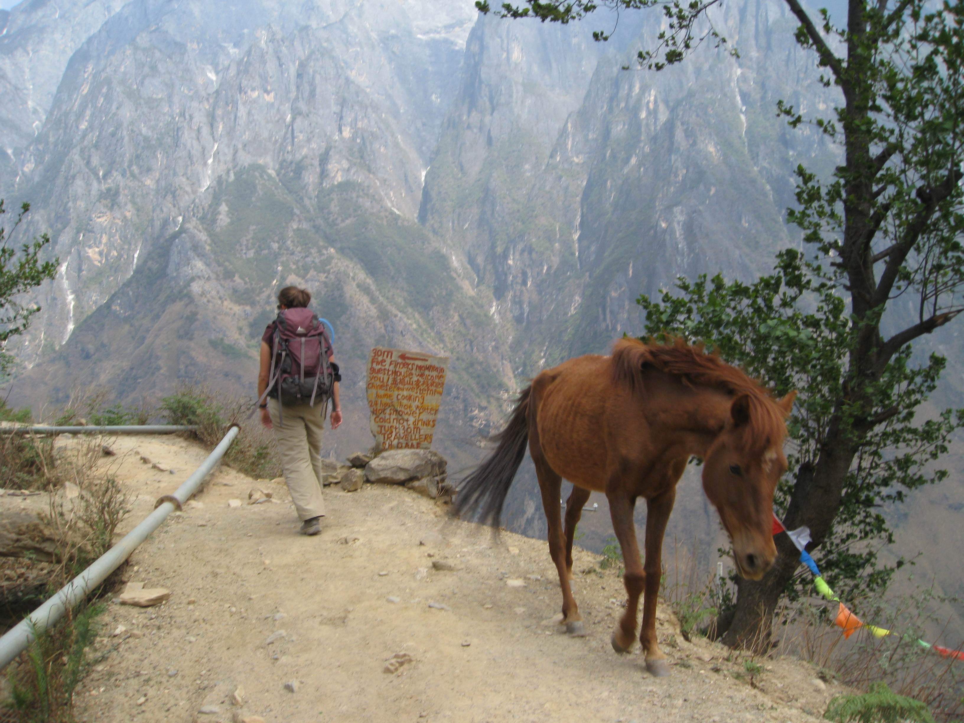 Cheval alezan à Lijiang, Yunnan, Chine